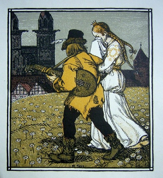 Illustration zu König Drosselbart: Spielmann und Prinzessin. Lithographie, 14 x 12 cm